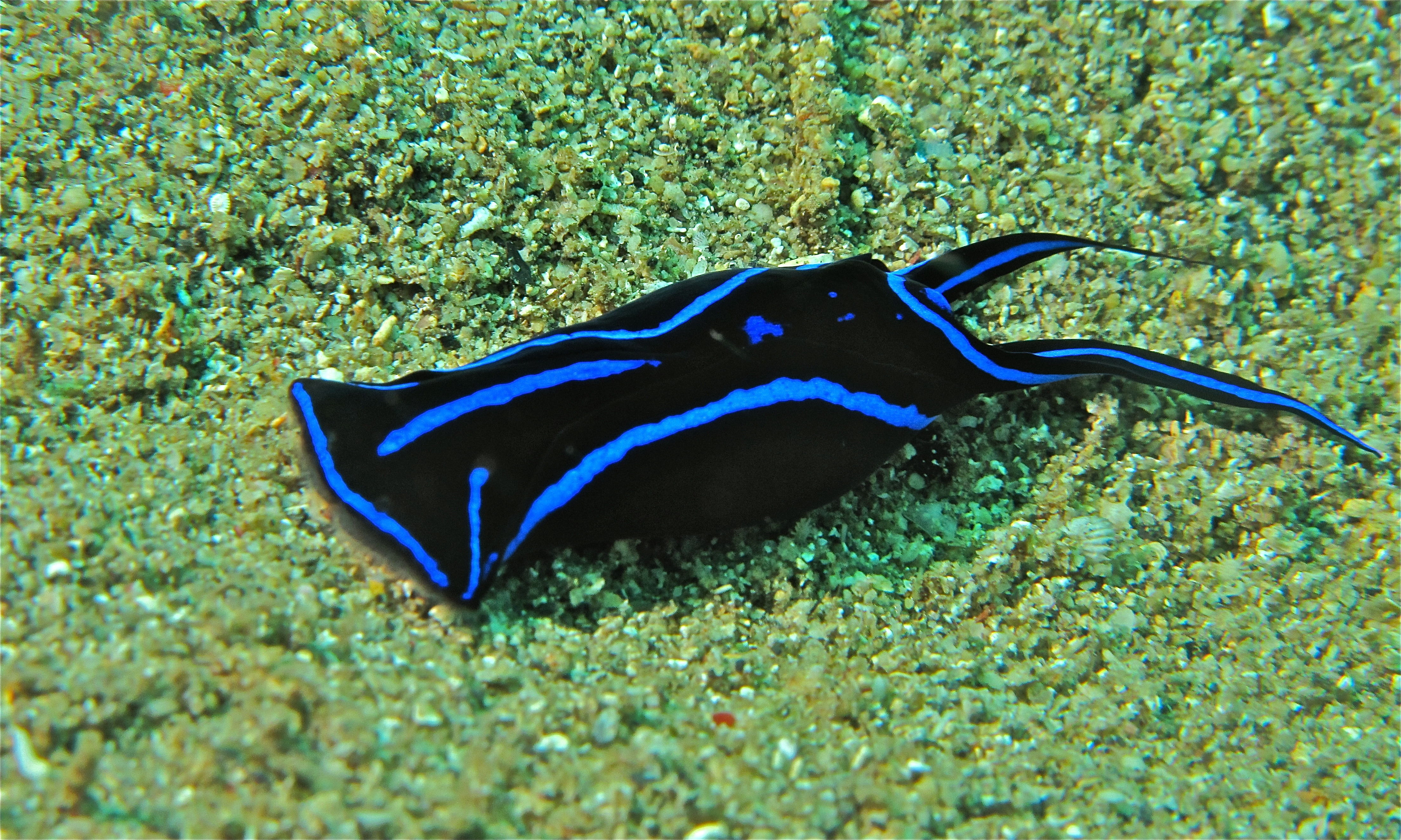 Wori I, Manado, Sulawesi, INDONESIA